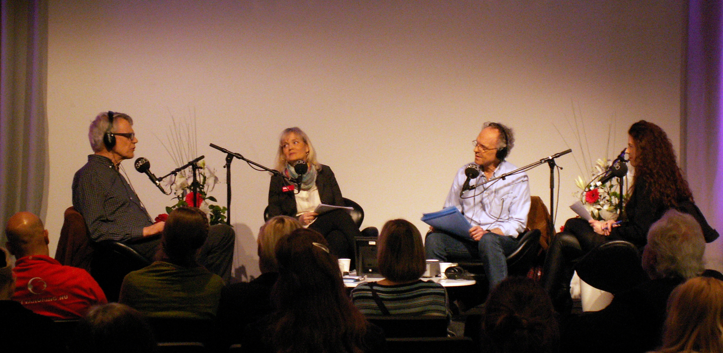 Radioprogrammet Spanarna i Sveriges Radio P1.